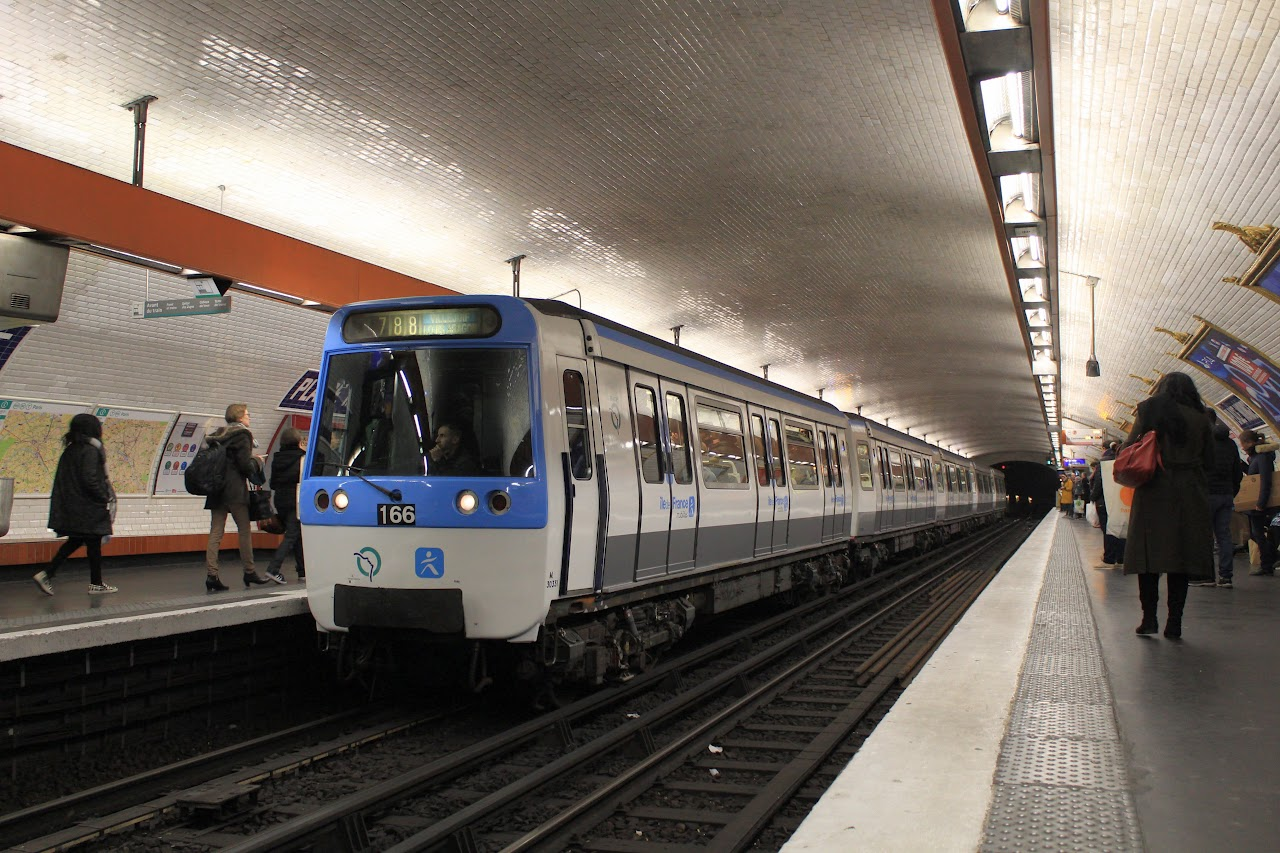 MF77 n°166 rénové avec la livrée Île-de-France Mobilités sur la ligne 7 du métro de Paris à la station Place Monge.